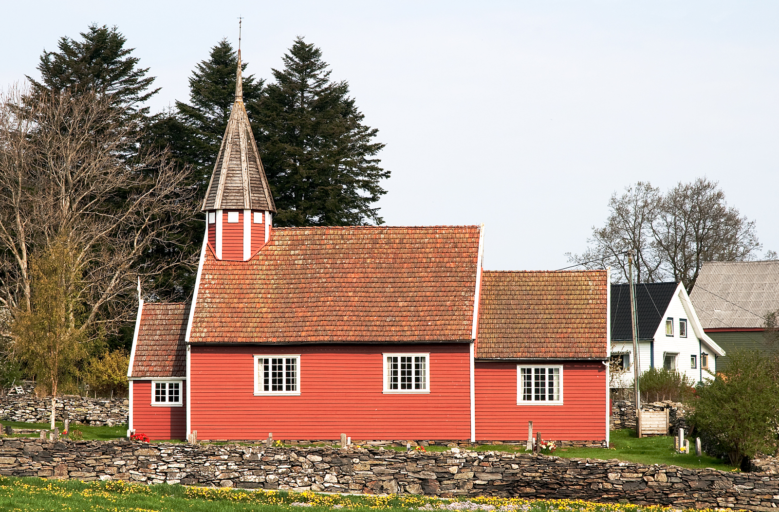 Sjernarøy kyrkje sett frå sida